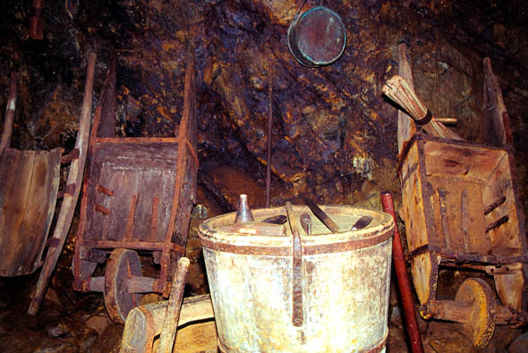 Copper Mine in Falun (Sweden), Photographer Wigulf